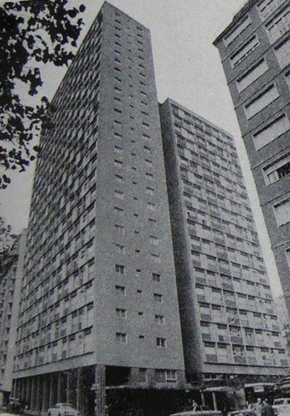 Vista del edificio Palacio Edén (1958/1962), en la esquina de las calles Bolívar y Buenos Aires de la ciudad de Mar del Plata.